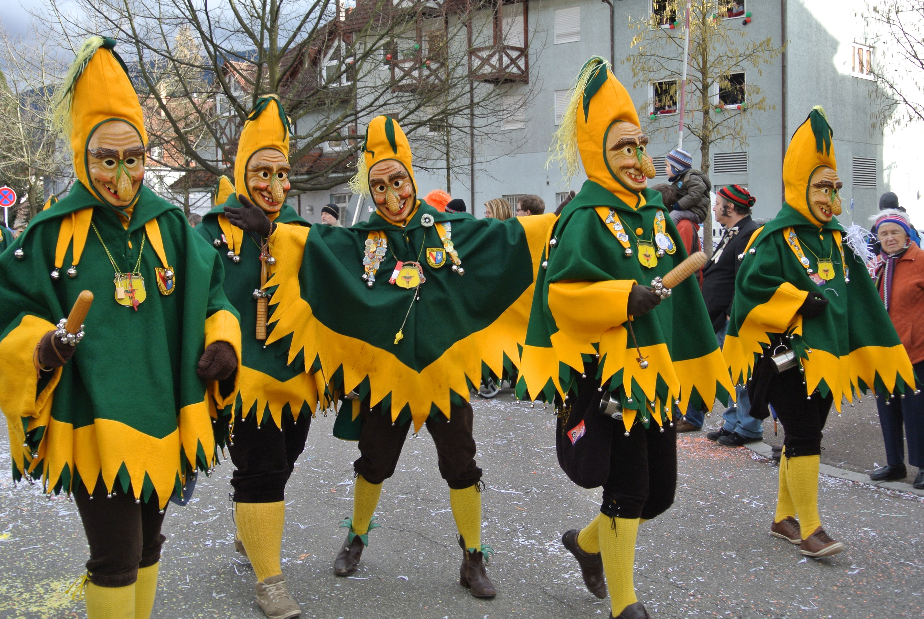 Hästräger der Denzlinger Narrenzunft der Welschkorngeister beim Jubiläumsumzug 22 Jahre Stein-Krähen-Hexen Kollnau am 9. Februar 2014